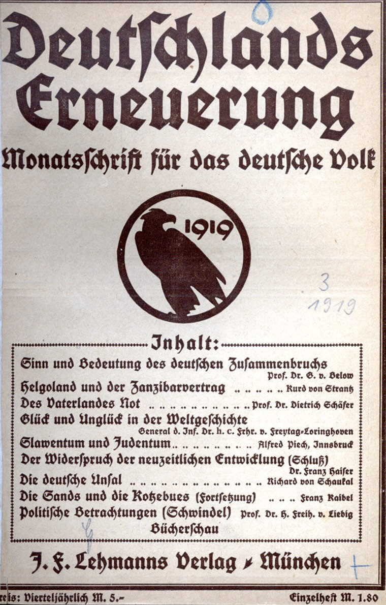 Titelblatt der Zeitschrift "Deutschlands Erneuerung", 3. Jg., Heft 1, 1919, erschienen im J. F. Lehmanns Verlag München.